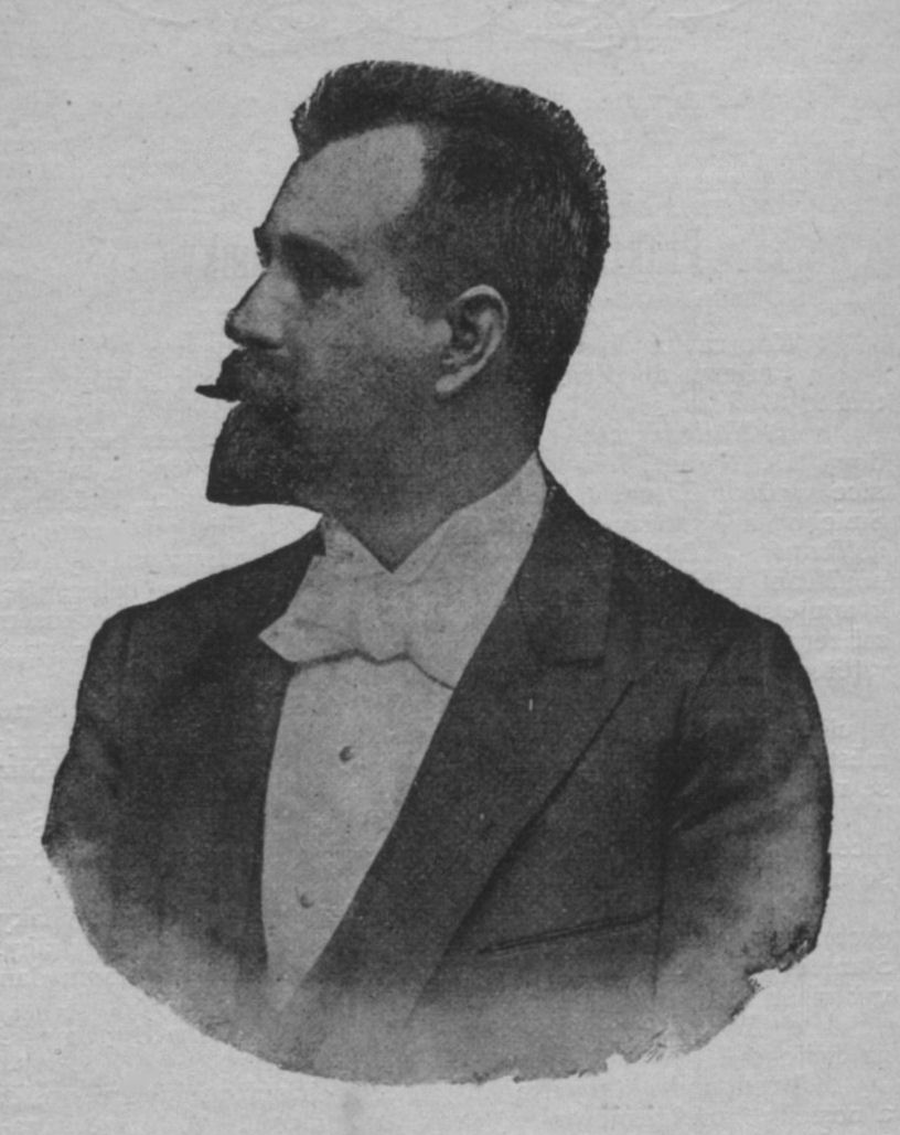 Česky: Vladimír Srb, pražský starosta v letech 1900-1906